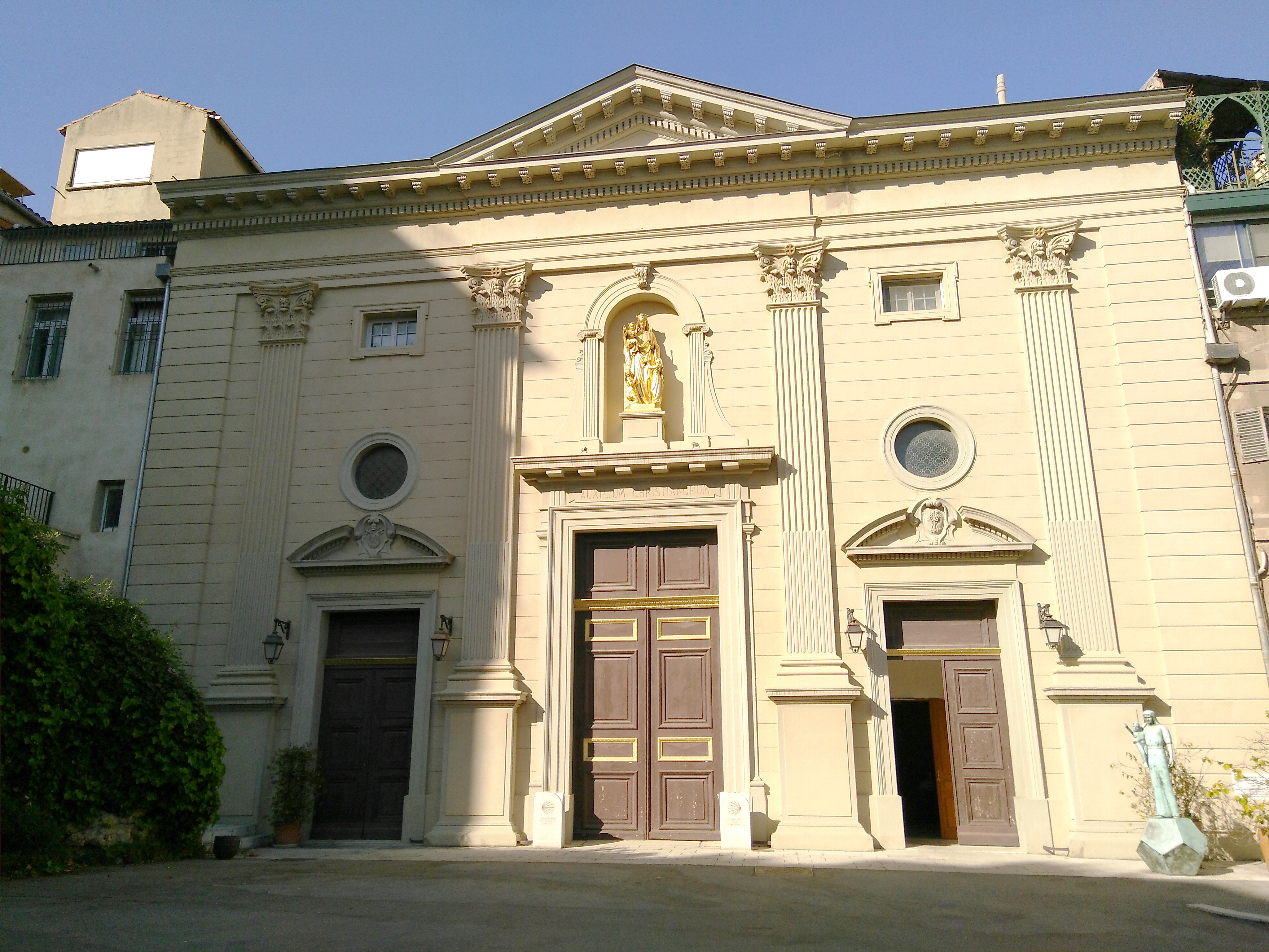 Façade donnant sur la place du Calvaire, séparée de la Place Daviel (ex Place du Palais) par une grille.